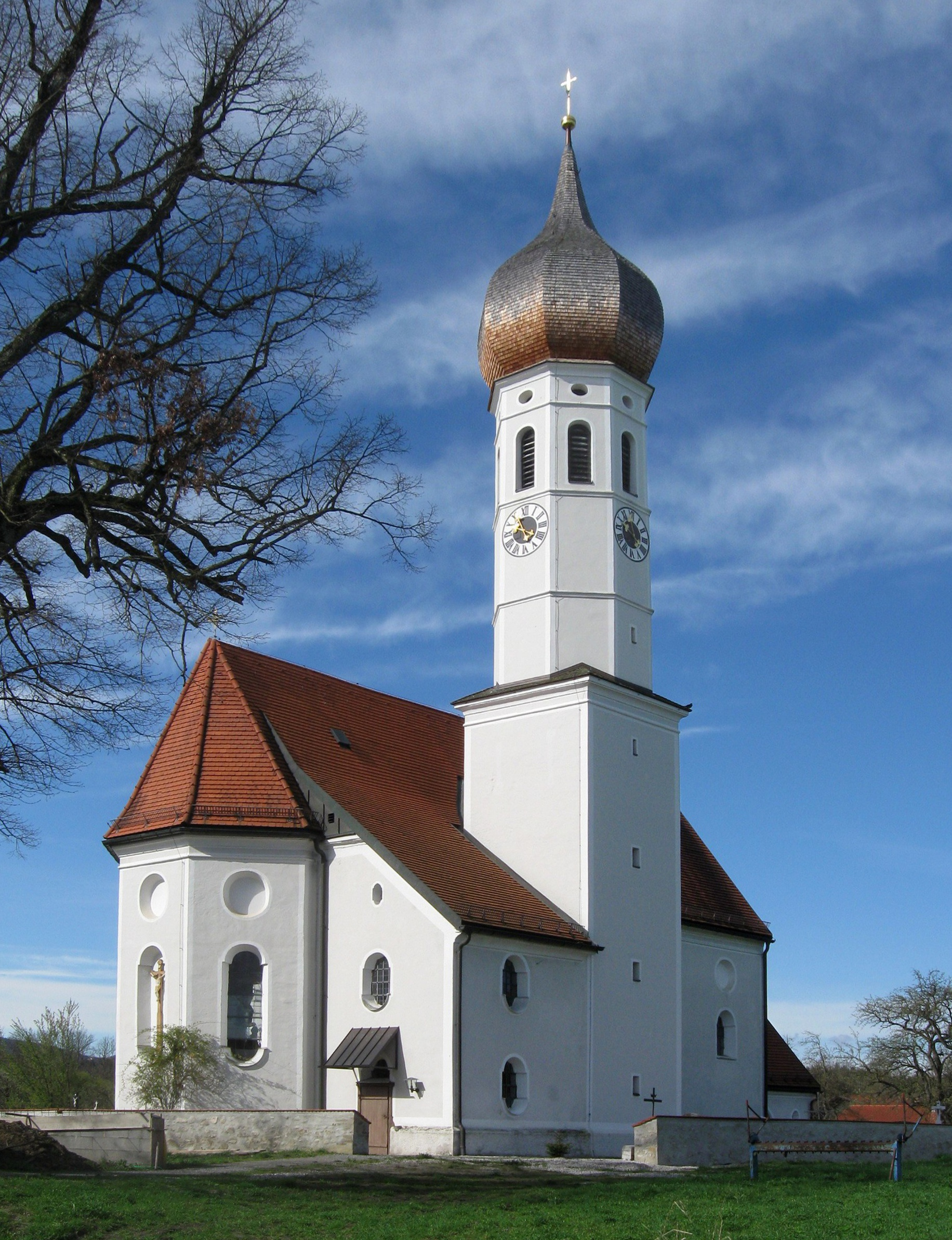 Irschenberger Straße 7; Filialkirche St. Korbinian; barocke Anlage, 1669, ausgebaut 1735; mit Ausstattung.